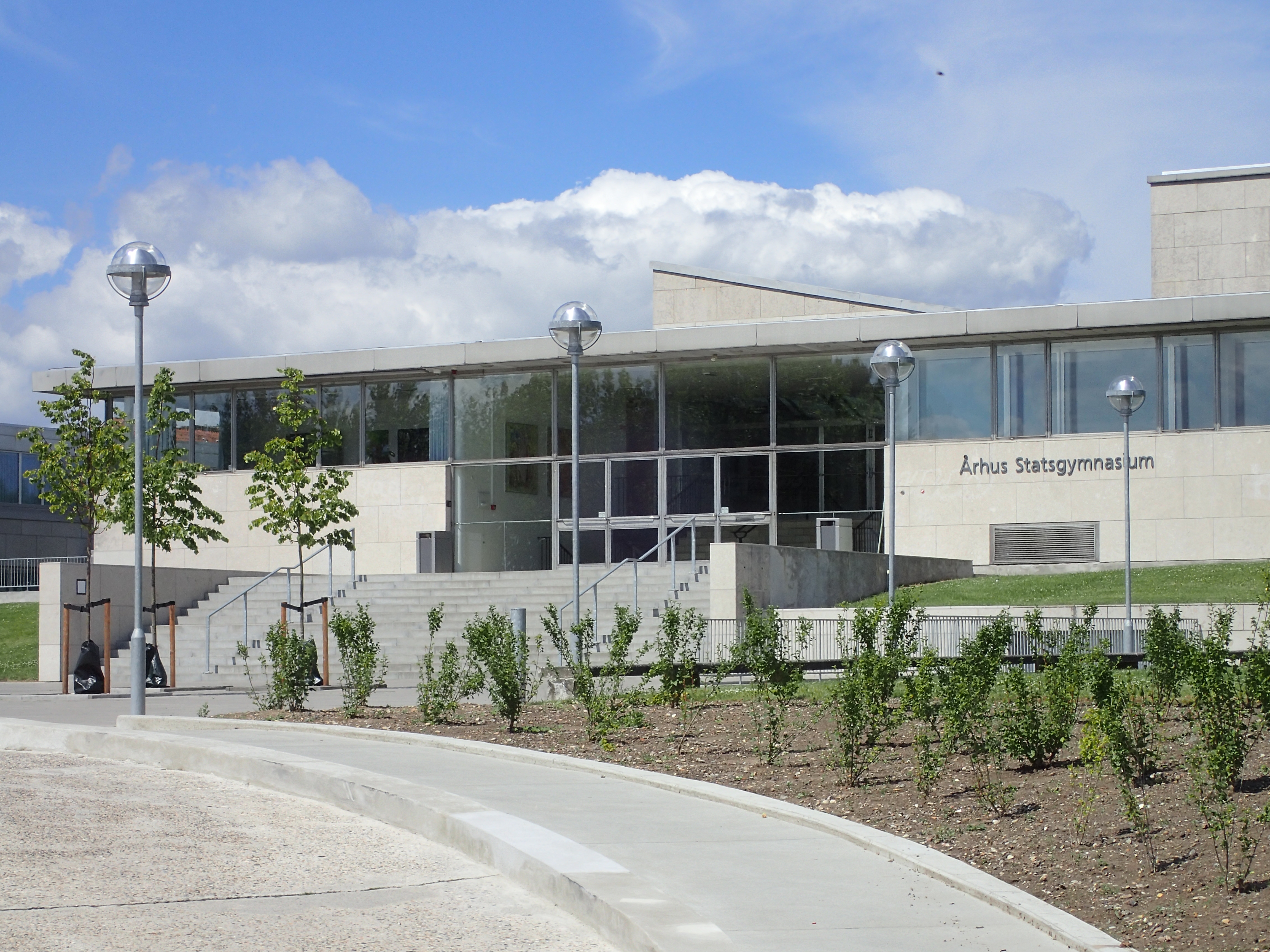 Århus Statsgymnasium i 2017. Gymnasiet med tilbygninger blev fredet i 2003. Bygningerne blev renoveret i 2010-15 under ledelse af arkitektfirmet Kjaer & Richter. Under renoveringen blev bygningerne også isoleret og gjort energibesparende. Der blev også foretaget enkelte om- og til-bygninger og hele projektet beløb sig til omkring kr 43 millioner.